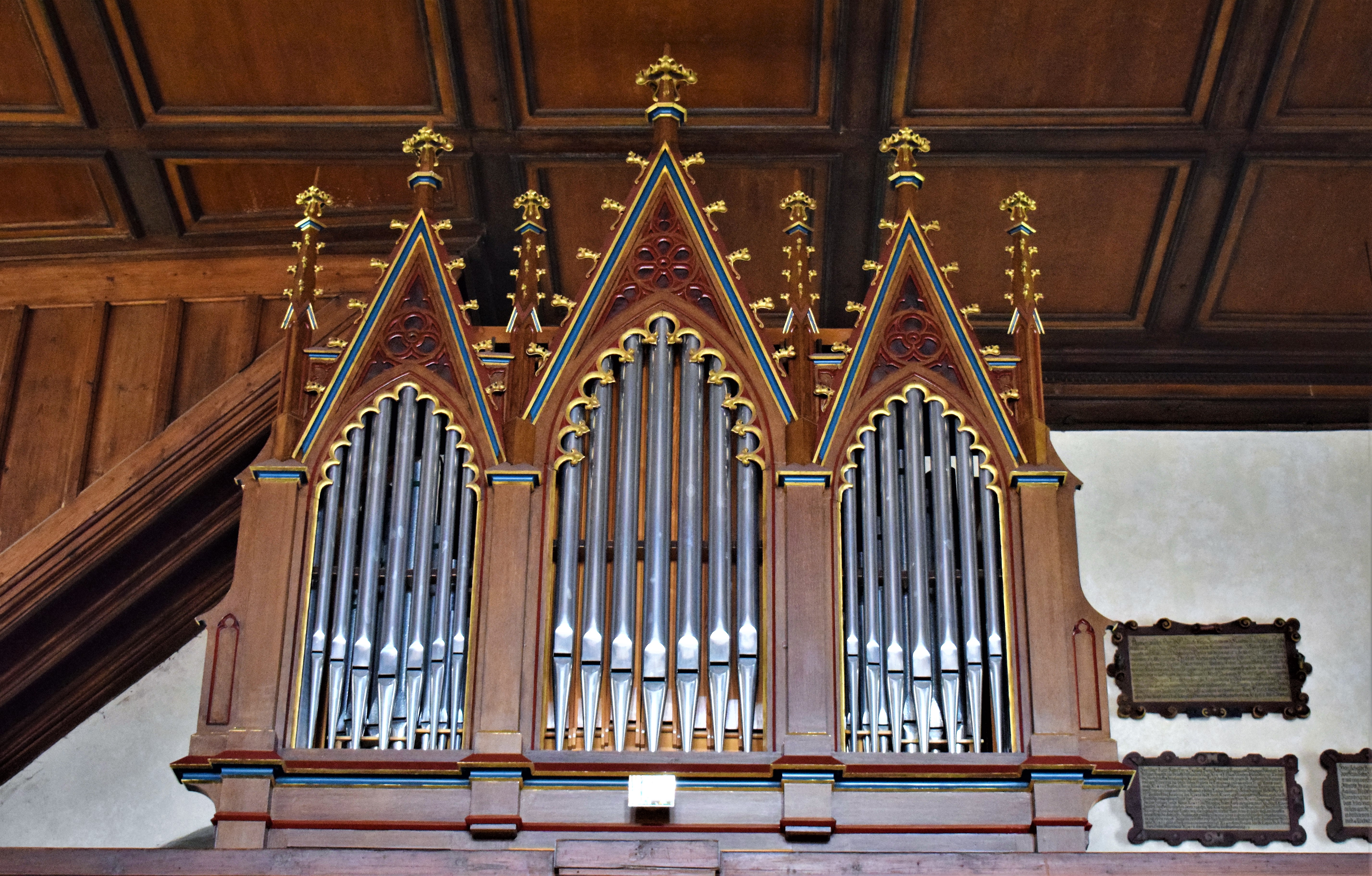 Rieterkirche Kalbensteinberg, neugotischer Orgelprospekt von 1899